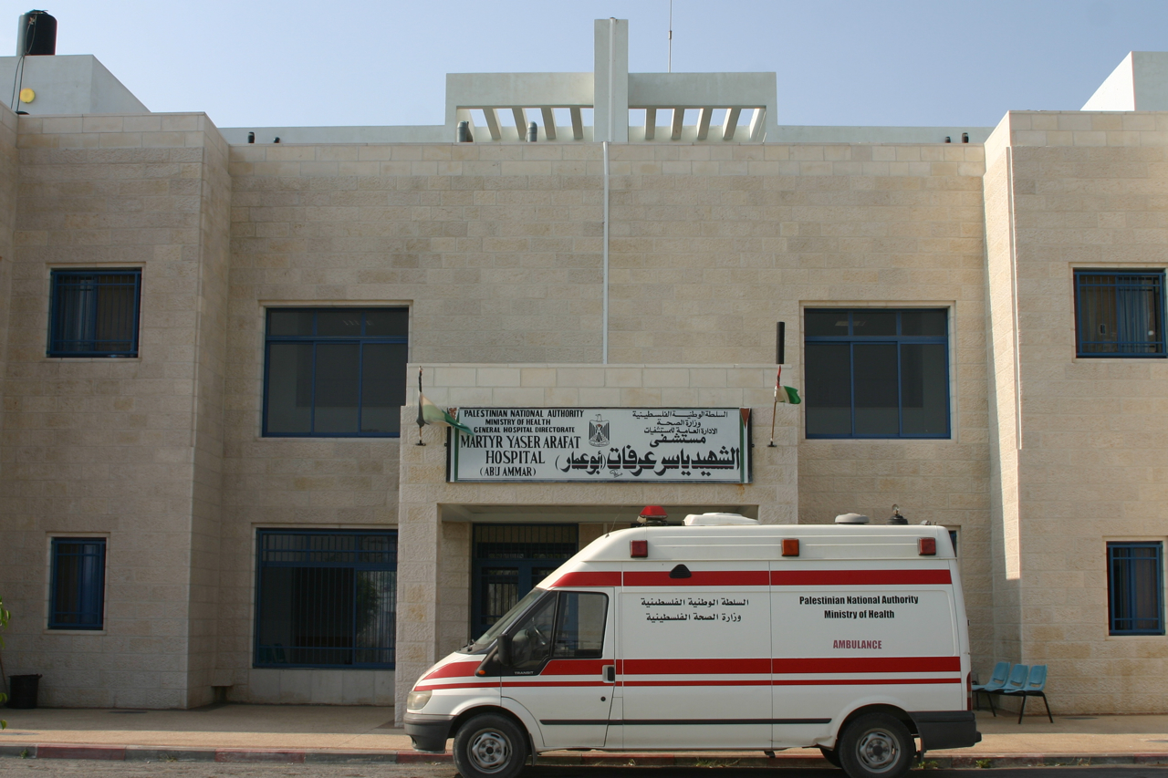 Das Krankenhaus der Stadt Salfeet (Salfit) in Palästina. Object location32° 04′ 25″ N, 35° 10′ 25″ E View all coordinates using: OpenStreetMap - Google Earth